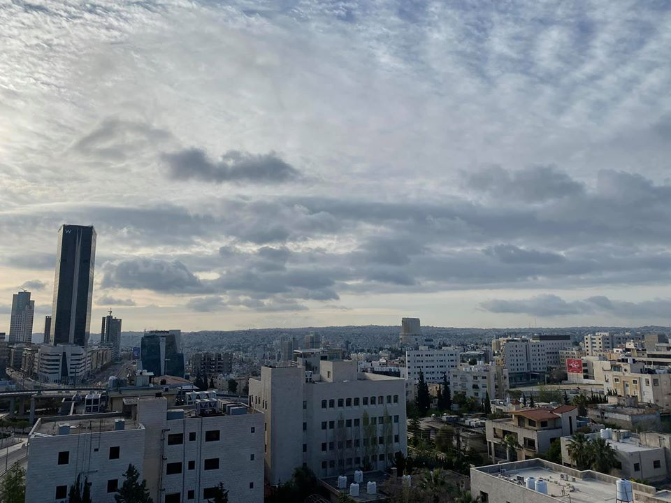 منطقة الشميساني في عمان صباحاً